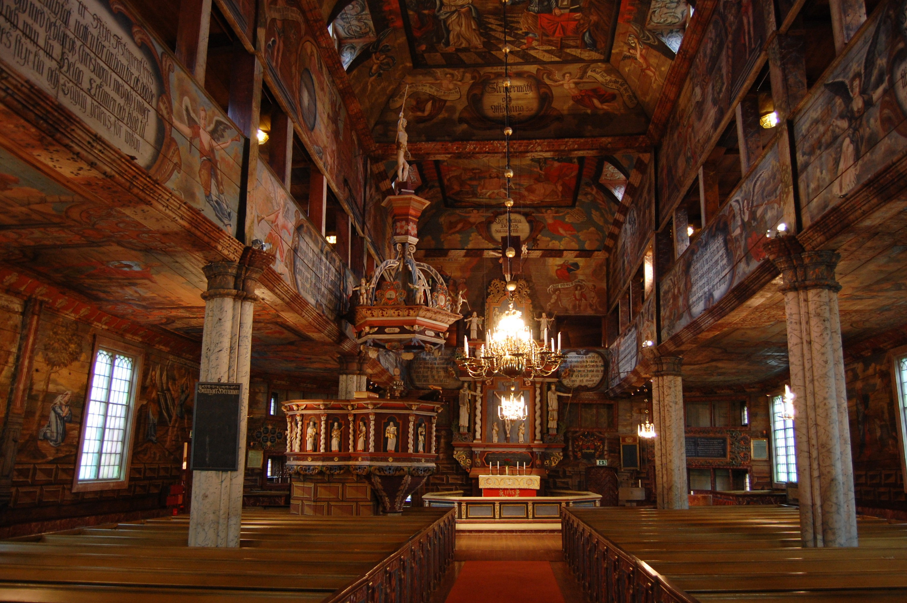 Innenansicht Kirche von Habo